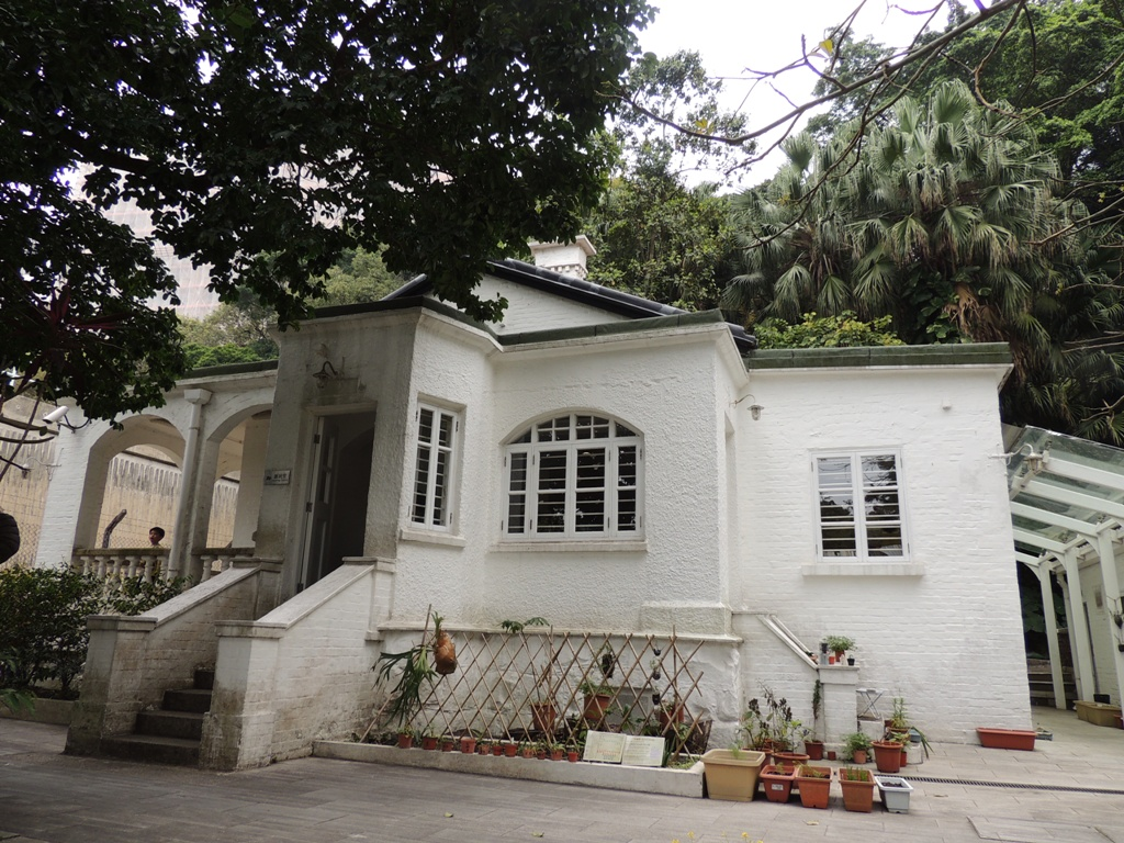 Bungalow, West Point Filters